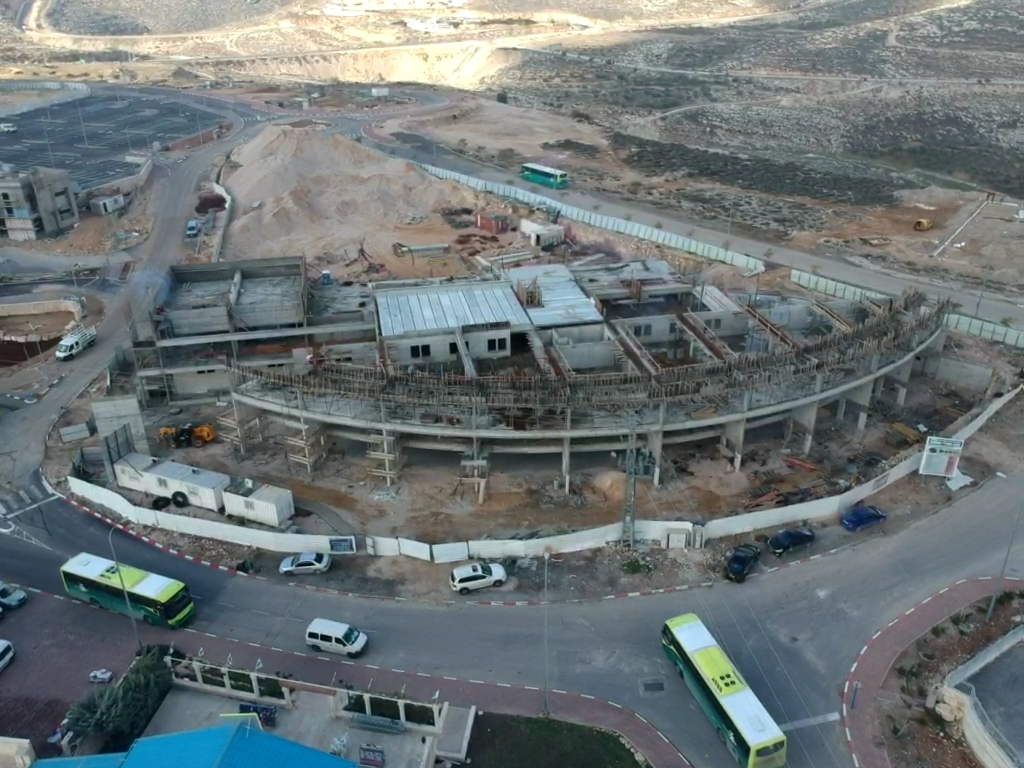 תהליכי הבנייה של מבנה המועצה החדש